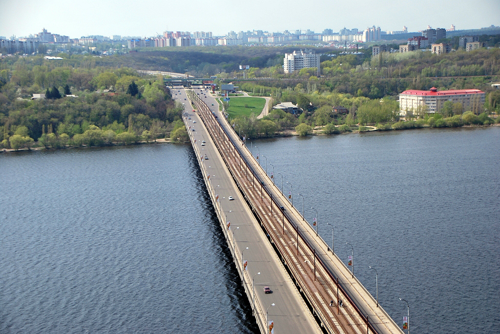 Трамвайная линия по Северному мосту в городе Воронеже